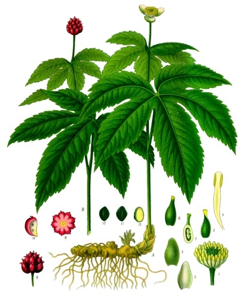 Kanadische Orangenwurzel. A B blühende und fruchtende Pflanze in natürl. Grösse; 1 Blüthe ohne Kelchblätter, vergrössert; 2 u. 3 Kelchblätter von verschiedenen Seiten, desgl.; 4 Staubgefässe, desgl.; 5 u. 6 Carpelle nach der Darstellung in Bot. Mag. und in Bentley, desgl.; 7 Fruchtknoten im Längsschnitt, desgl.; 8 Fruchtköpfchen, etwas vergrössert; 9 dasselbe im Querschnitt, desgl.; 10 ein Fruchtfach, desgl.